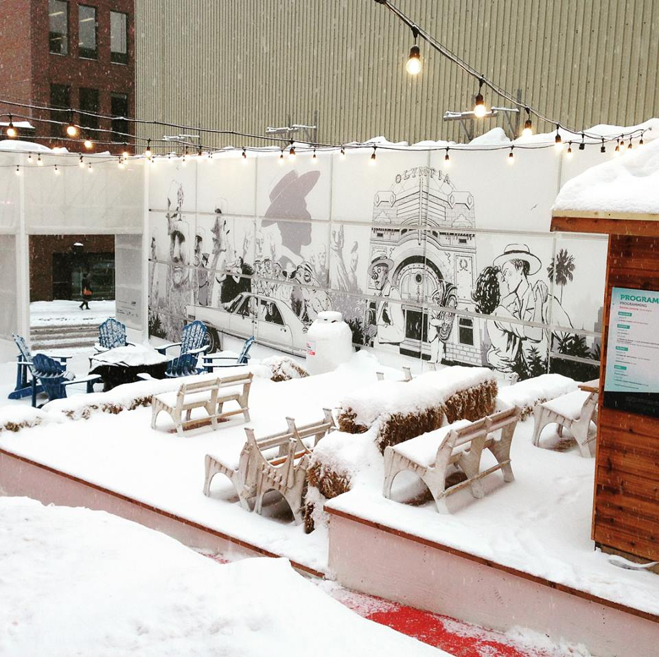 Le Passage OlympiaConcept de place éphémère de la ville de Québec